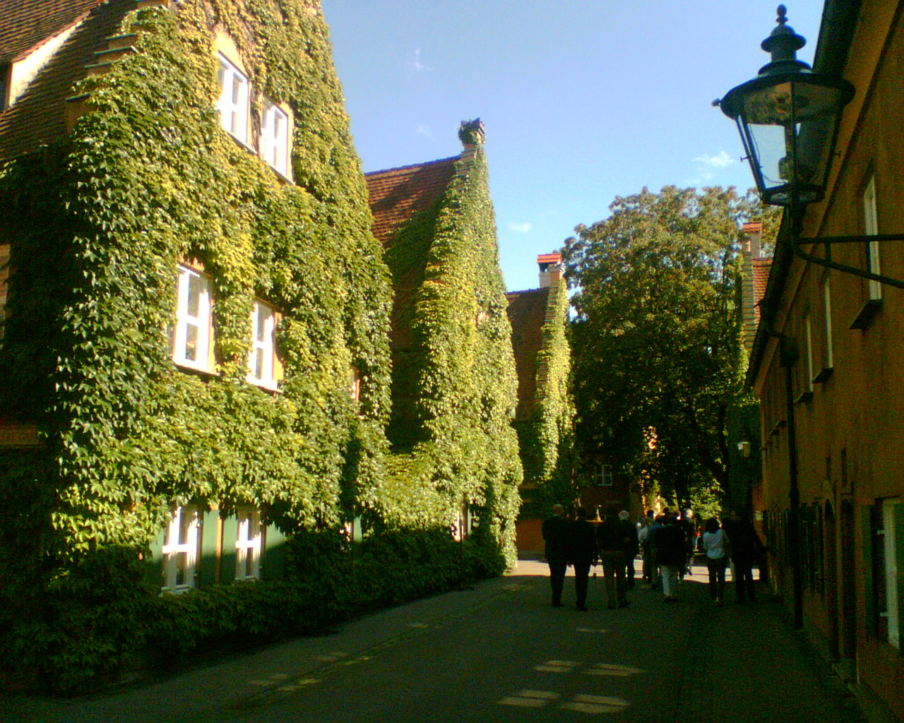 olicla